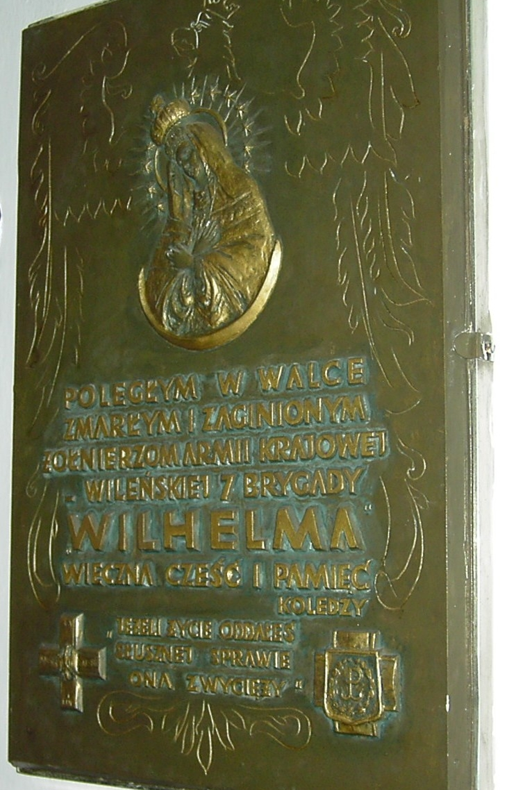 Tablica poświęcona 7 Wileńskiej Brygadzie Armii Krajowej w Kościele pw. Matki Boskiej Ostrobramskiej w Szczecinie